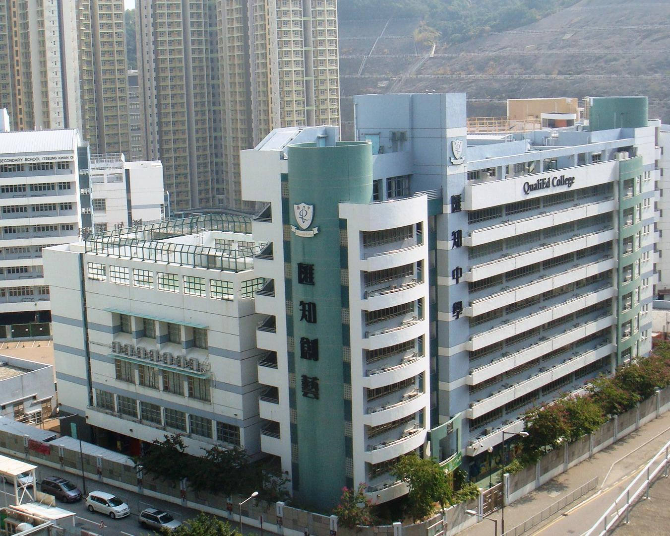 QualiEd College